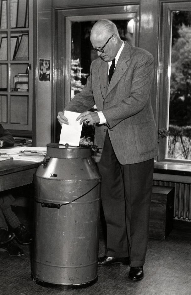 KVP-politicus C.P.M. Romme brengt met papier in de hand bij de stembus zijn stem uit bij de Tweede Kamerverkiezing. Nederland, Bloemendaal, 13 juni 1956.